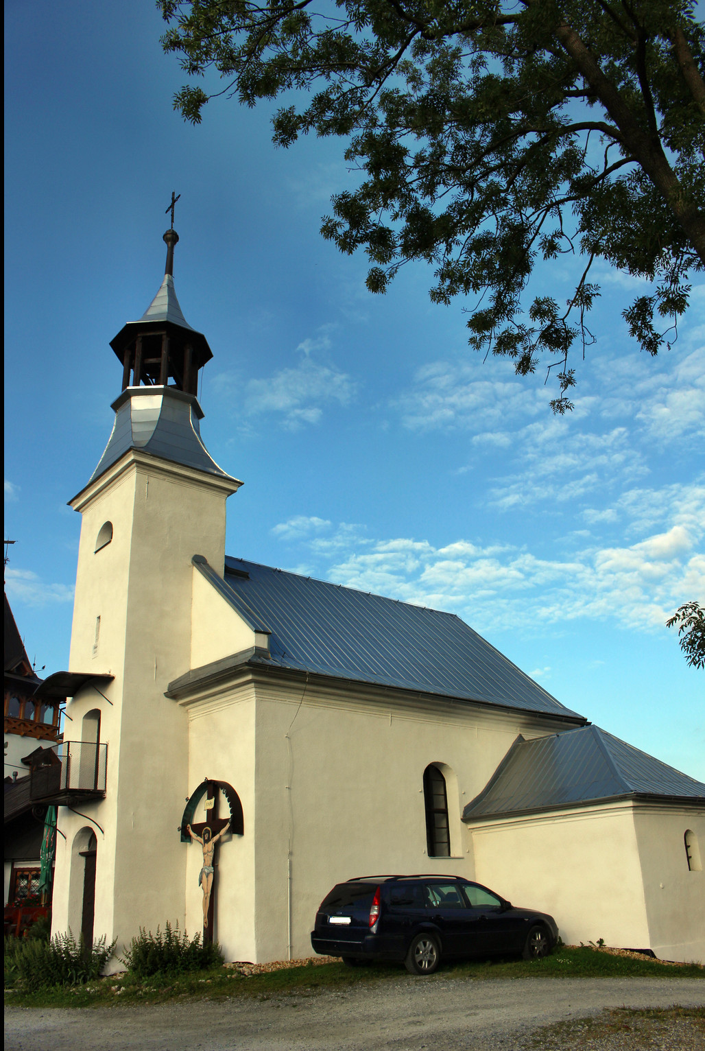 kaple sv. Anny na Křížovém vrchu u Jeseníku, Olomoucký kraj